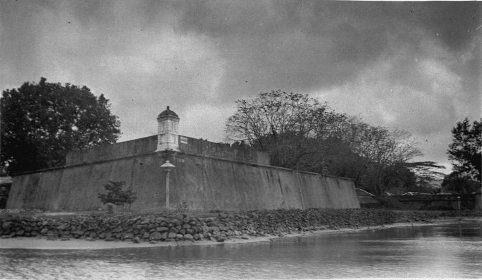 Foto. De hoektoren Groningen van VOC fort Nieuw-Victoria op Ambon